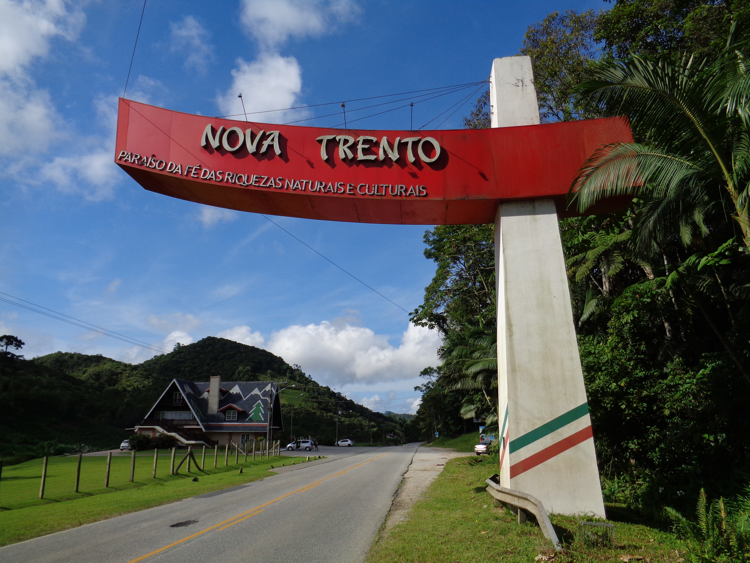 Pórtico na entrada de Nova Trento, em Santa Catarina, Brasil.